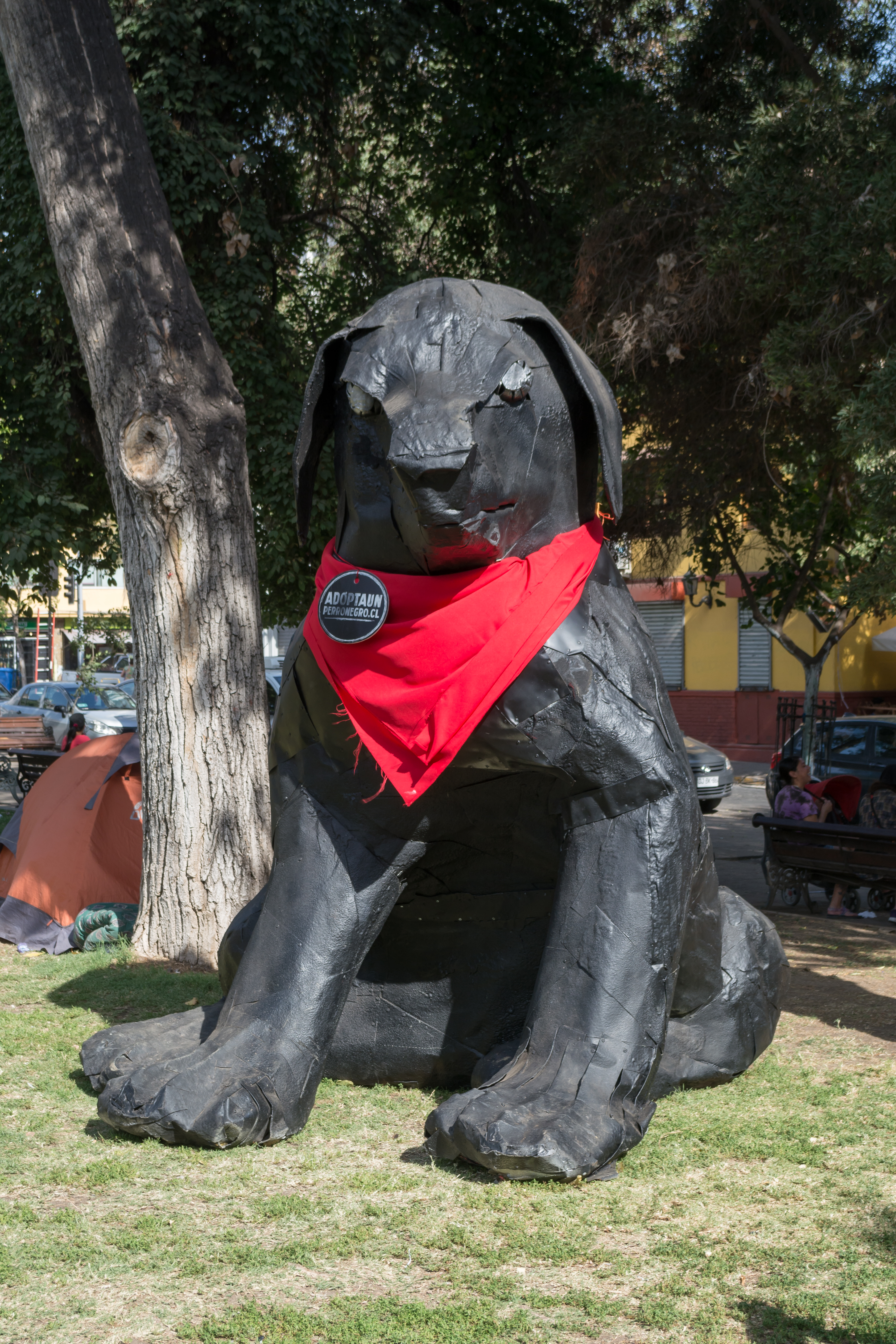 Negro Matapacos, Plaza Brasil, Santiago, Región Metropolitana, Chile